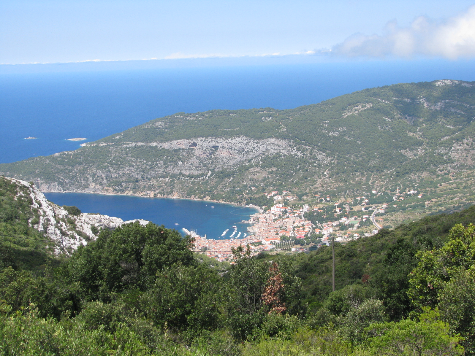 Pogled na Komižu i Komiški zaljev, otok Vis